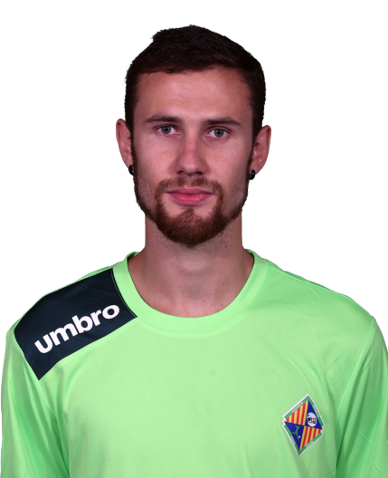 Felipe Paradynski